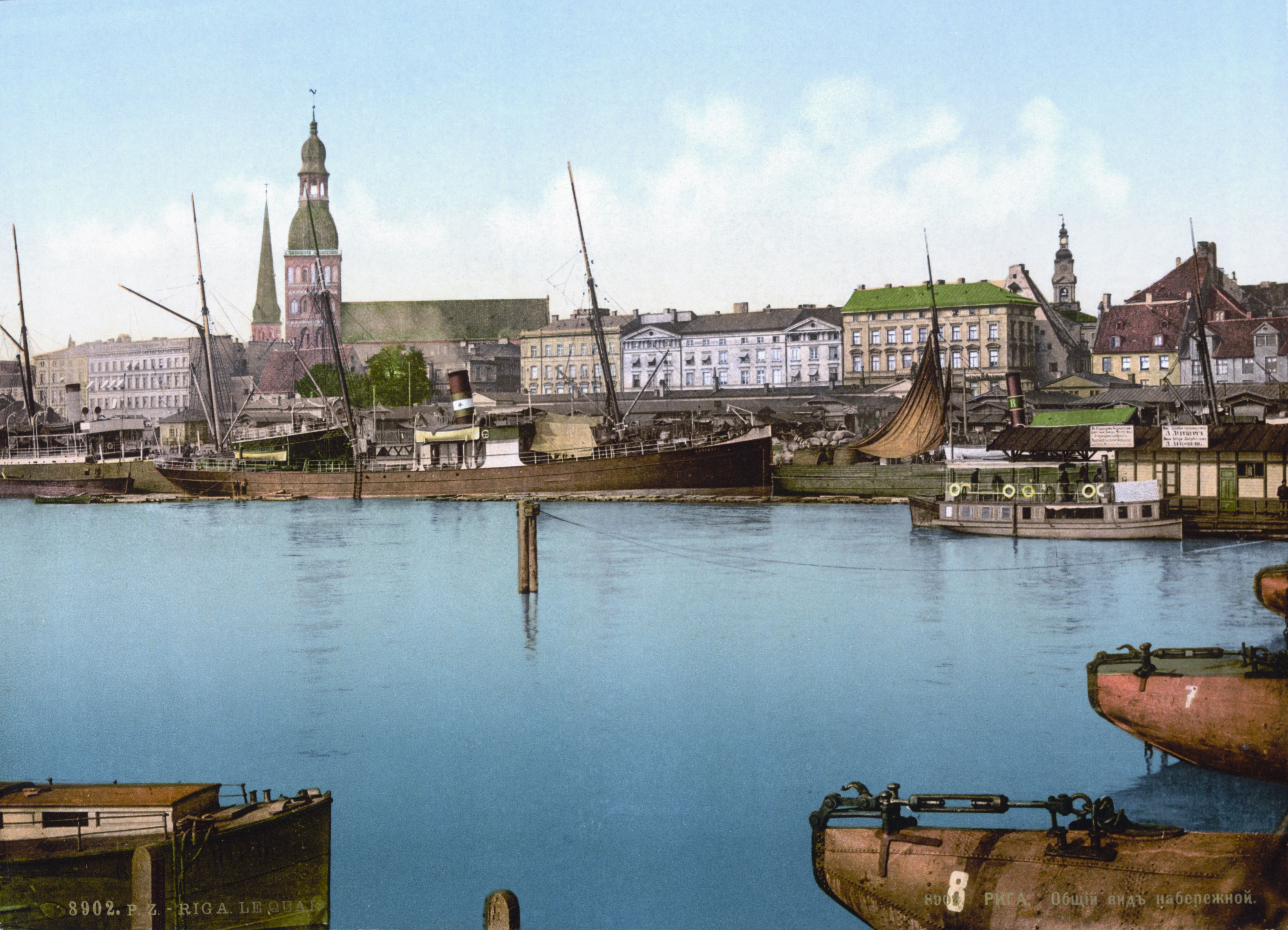 The quay, Riga, Russia, (i.e., Latvia)